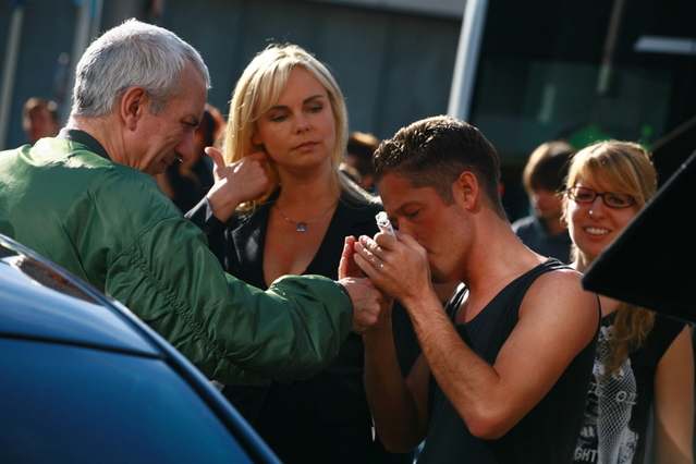 Benjamin Eicher und Ralf Richter bei der Arbeit